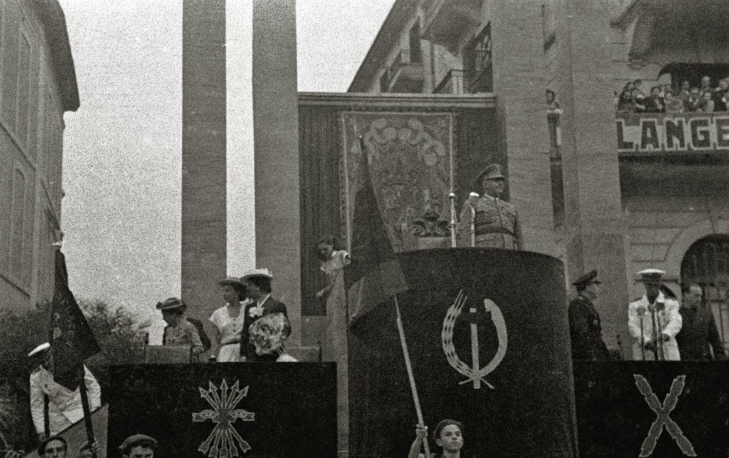 Título original: Visita de Francisco Franco a la localidad de Tolosa (15/21) Localización: Tolosa (Guipúzcoa)